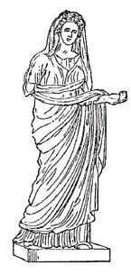 Stola uit W. Smith (ed.), Dictionary of Greek and Roman Antiquities, Londen, 1870, p. 1073.